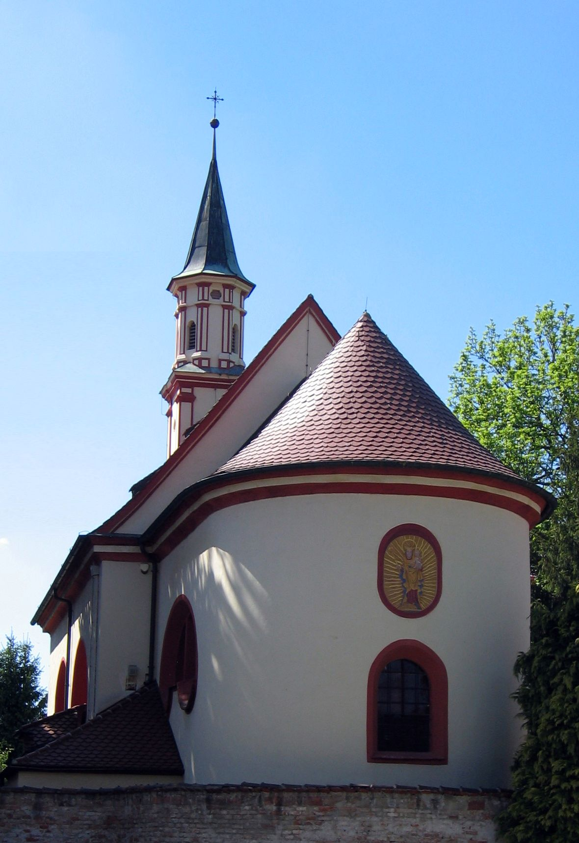 Zusehen ist die Muttergotteskapelle in Haunstetten